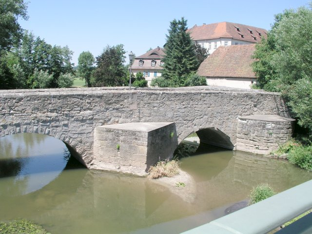 Mittelalterliche Brücke über die Aisch in Höchstadt (selbst fotografiert)